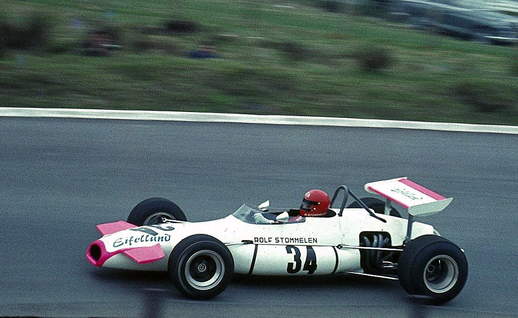 Rolf Stommelen im Brabham BT30 beim Training zum Eifelrennen